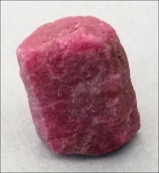 Robin (Índia)